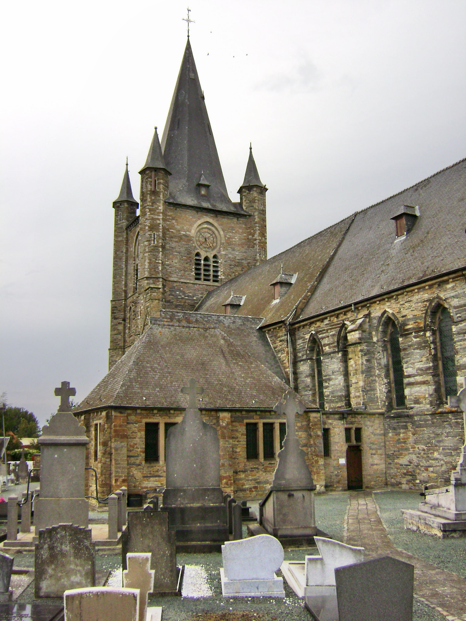 Sint-Petrus-en-Pauluskerk met kerkhof